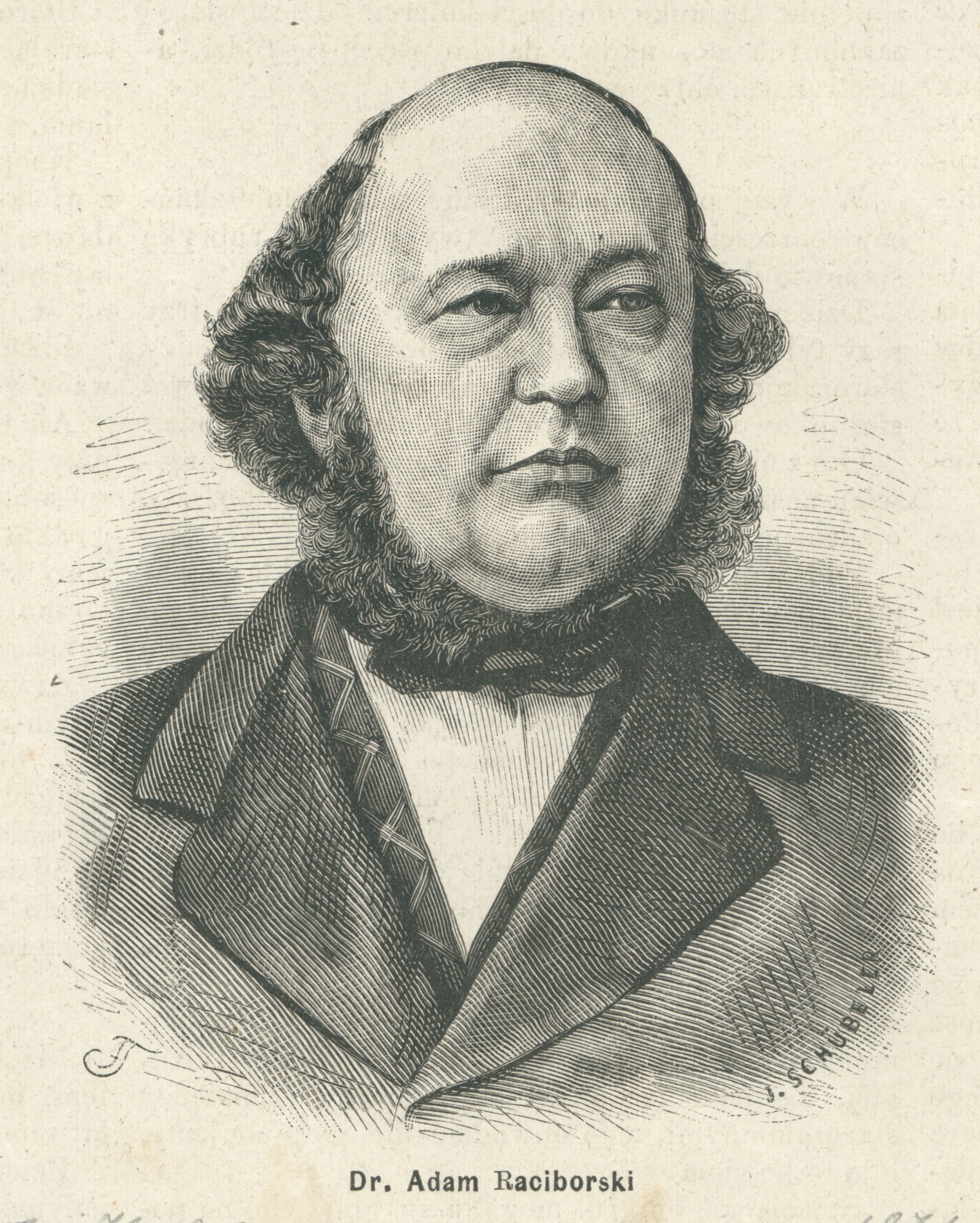 Adam Raciborski